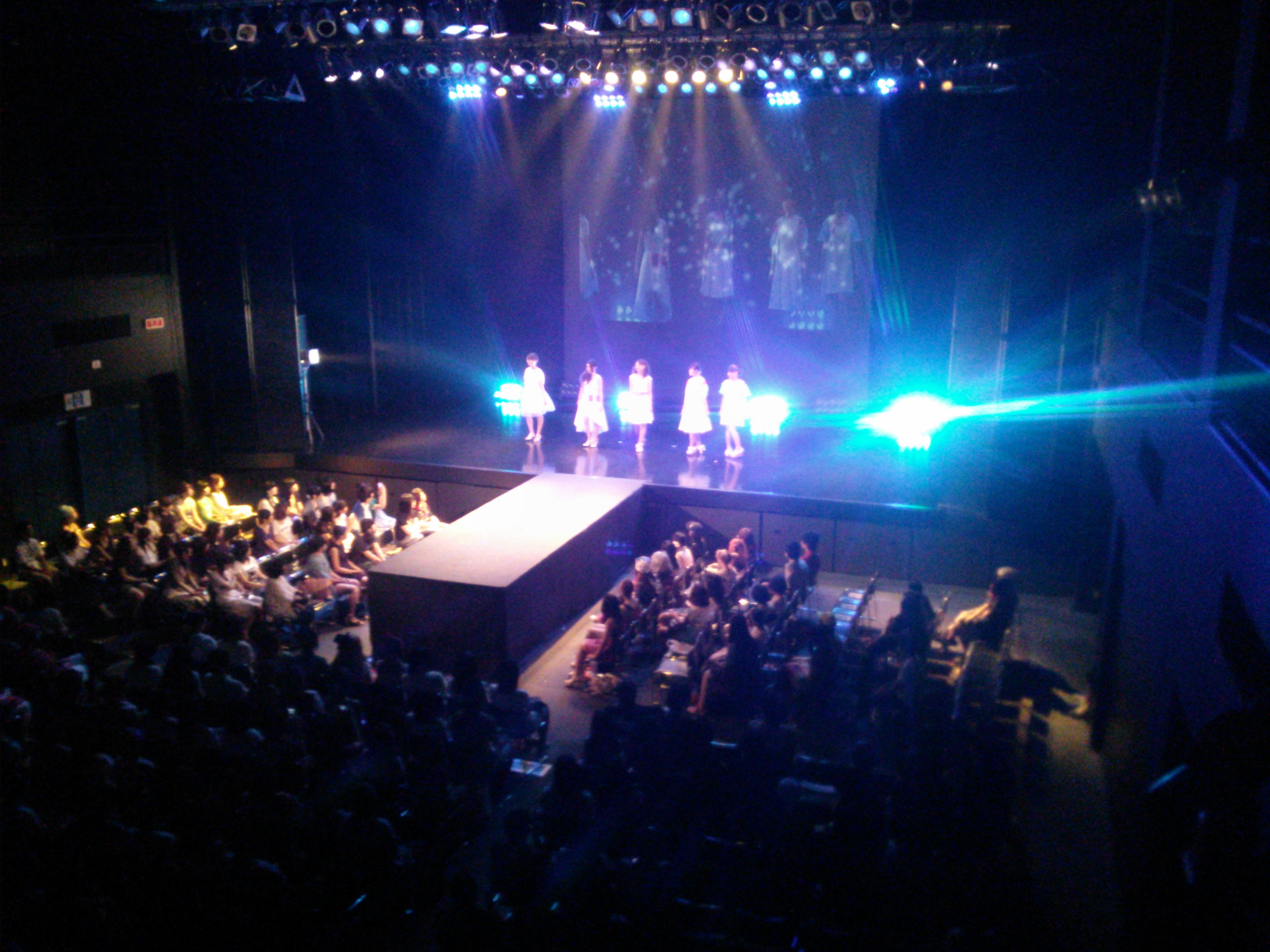 ゼップでのショー